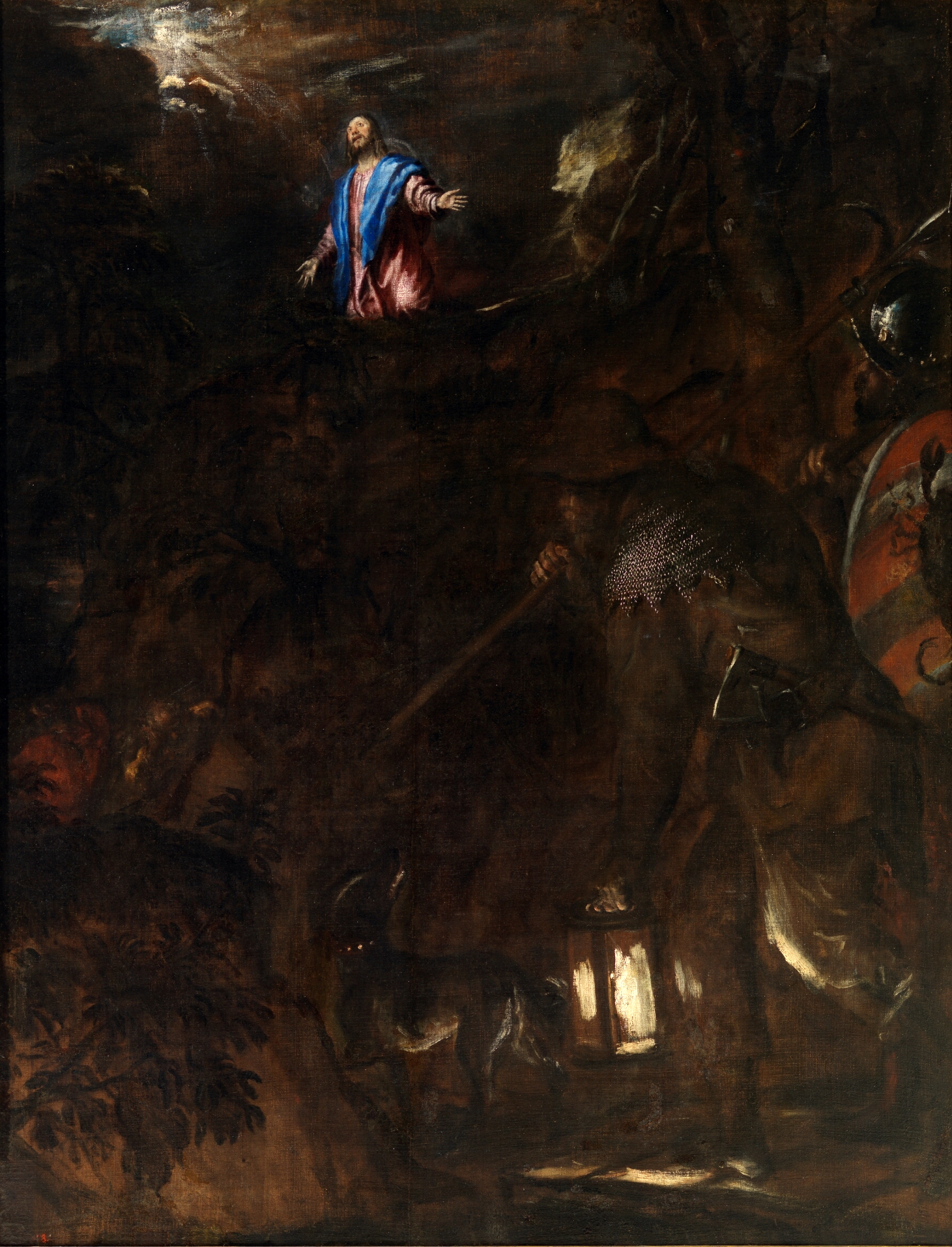 La obra representa a Jesucristo rezando en el Huerto de los Olivos en la víspera de su pasión y muerte.